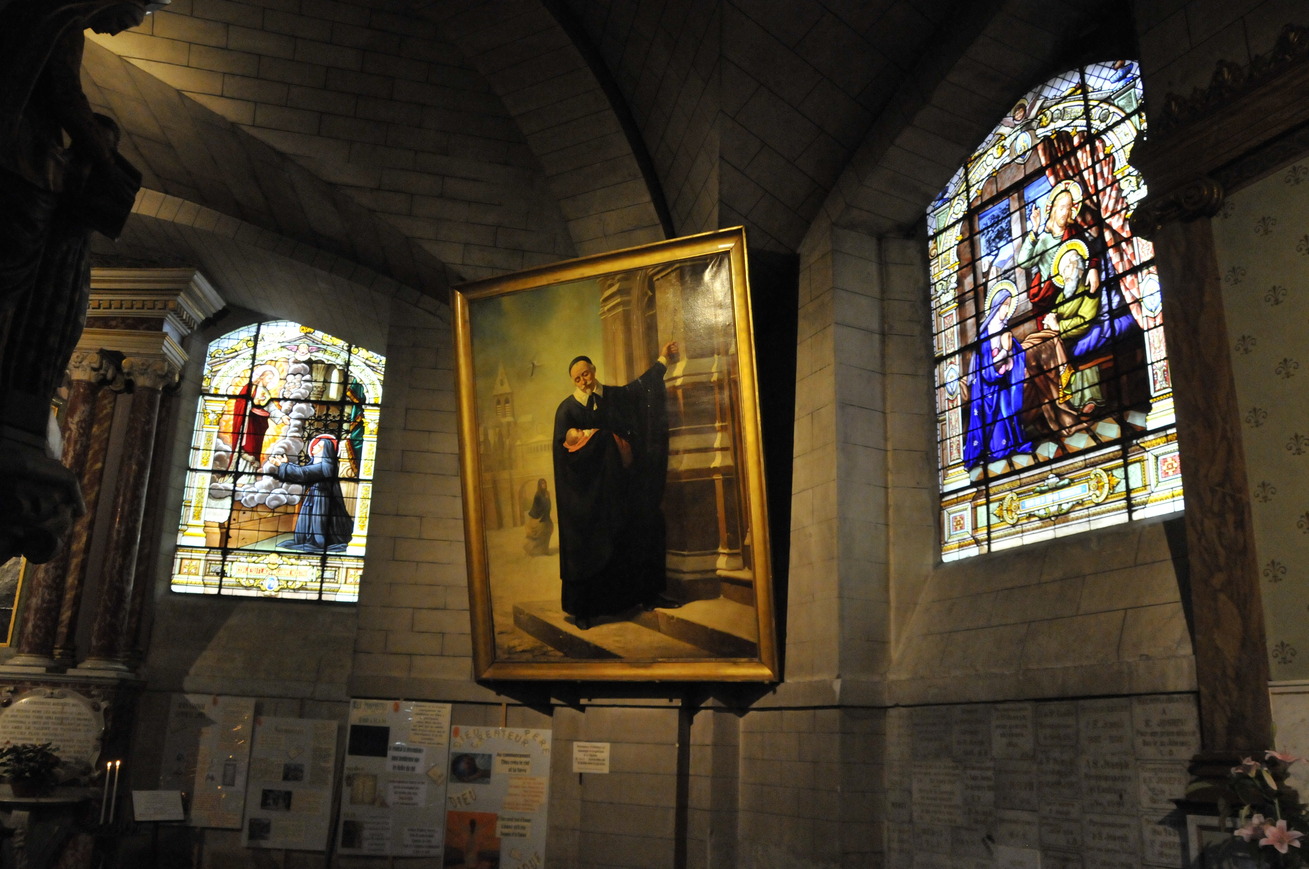 Dax